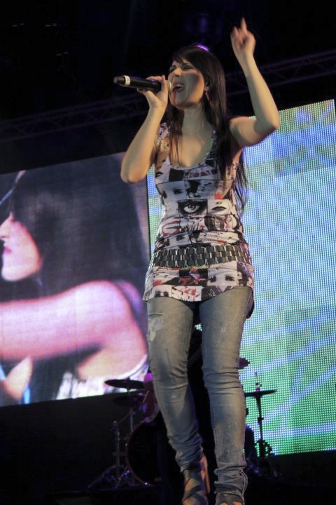 María Villalón actuando en el Primavera Pop 2010 en Barcelona.